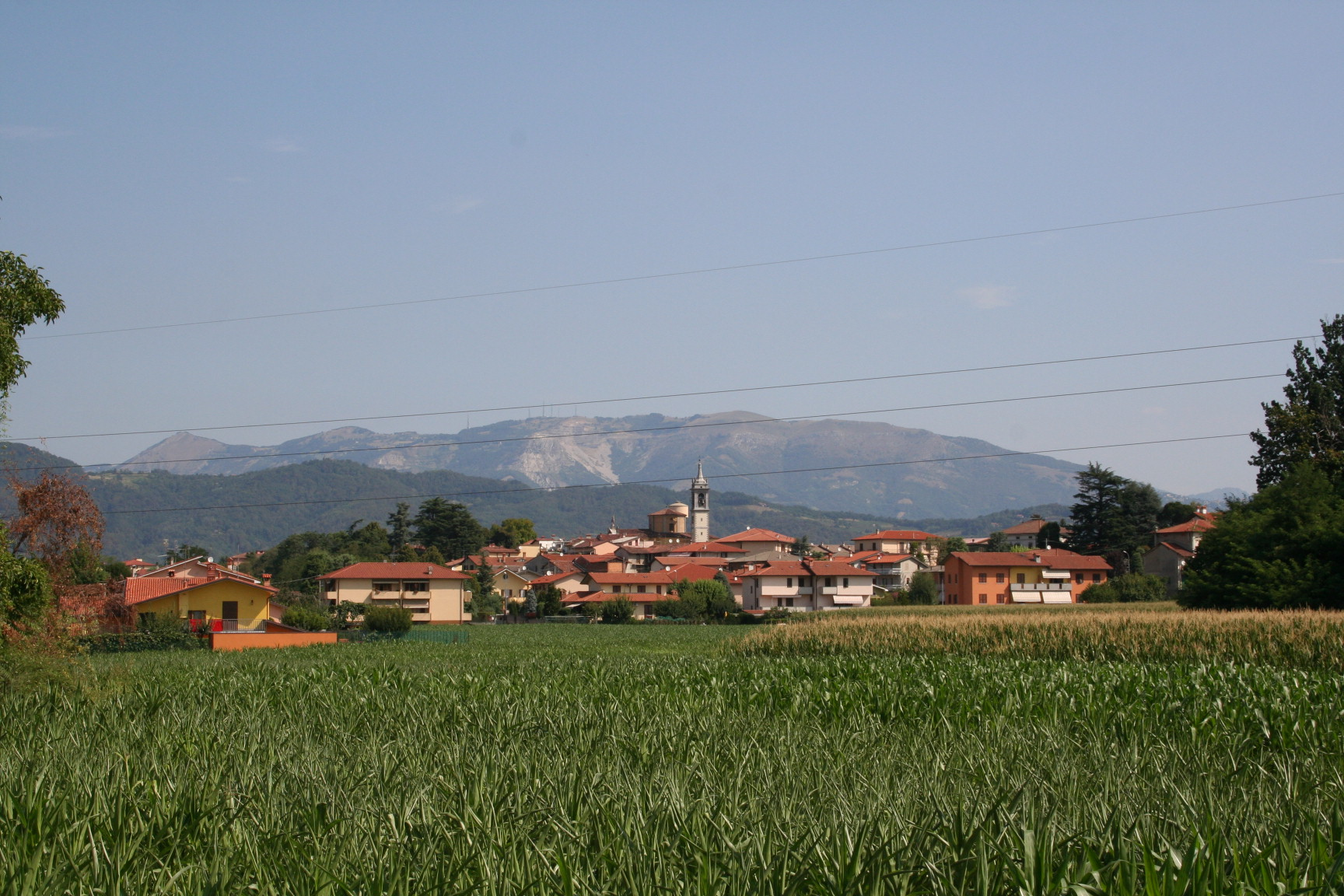 Medolago, Bergamo, panorama.